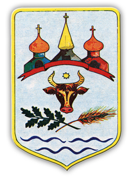 Герб села Бояни